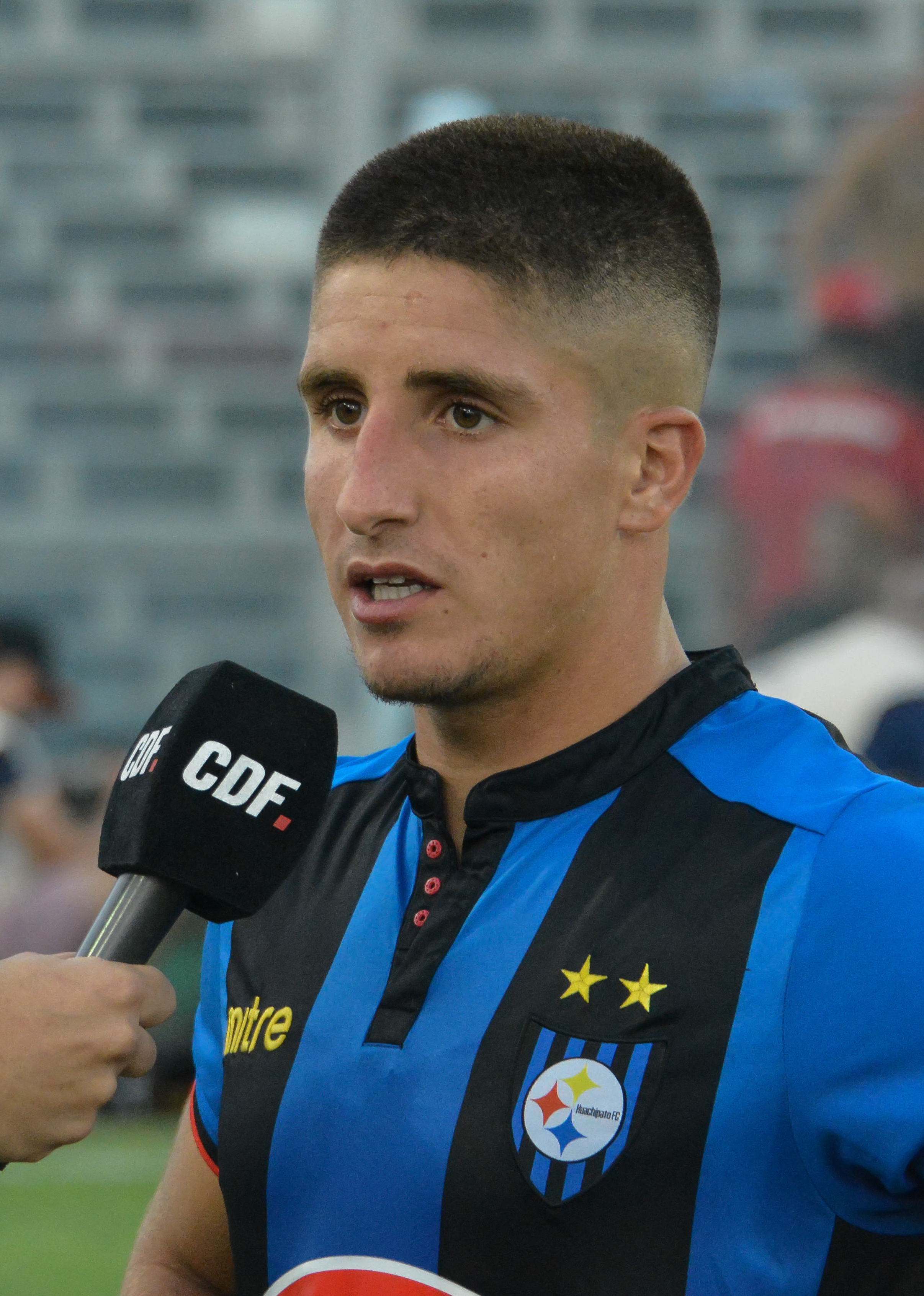 Juan Córdova, Colo Colo v Huachipato, Estadio Monumental, Santiago, Chile.